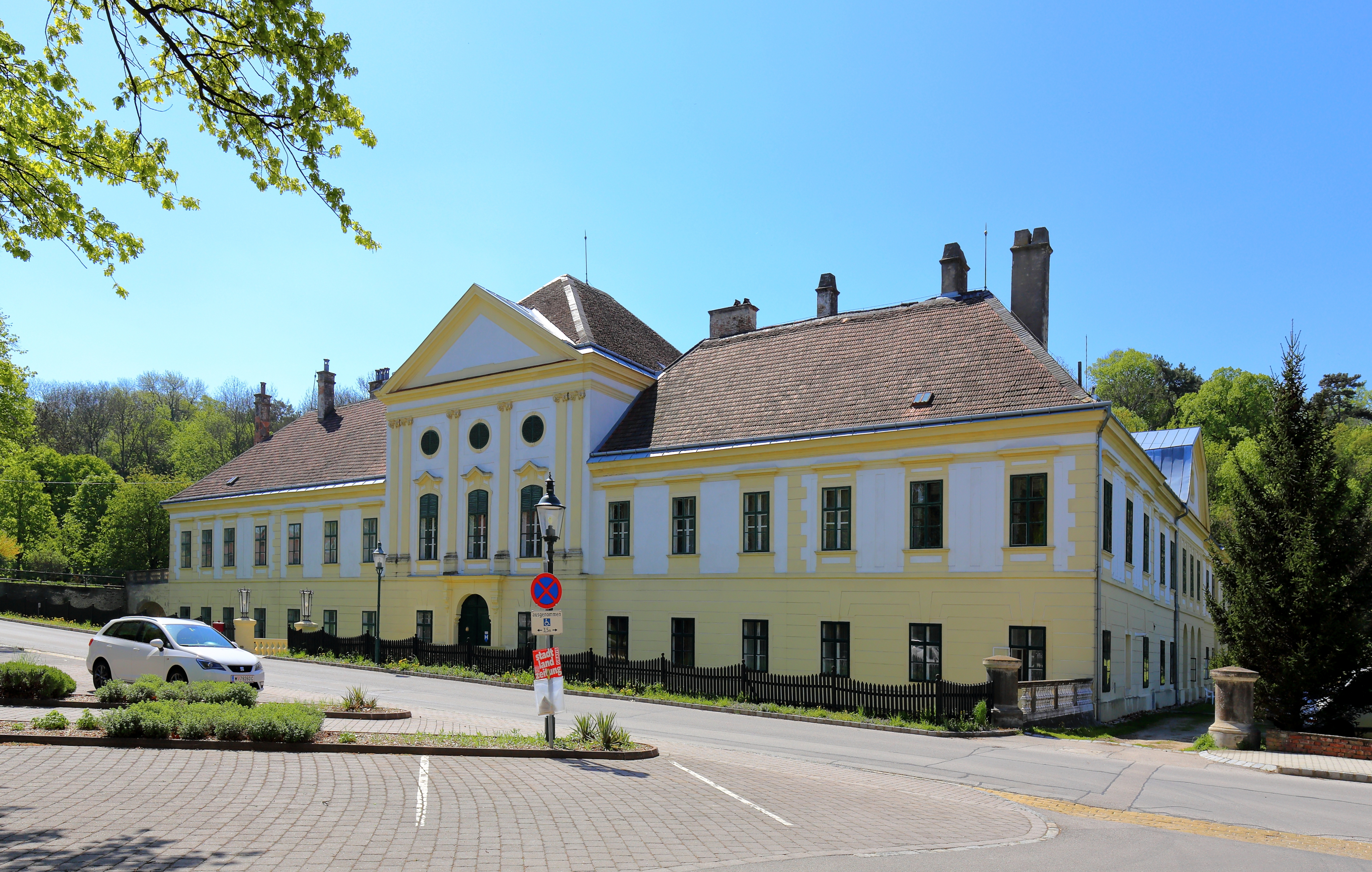 Nordostansicht der Schlosses Coburg bzw. Ebenthal in der niederösterreichischen Marktgemeinde Ebenthal.Ein barocker, vierflügeliger, zweigeschossiger Bau. Seit 1830 im Besitz der Familie Sachsen-Coburg-Gotha.